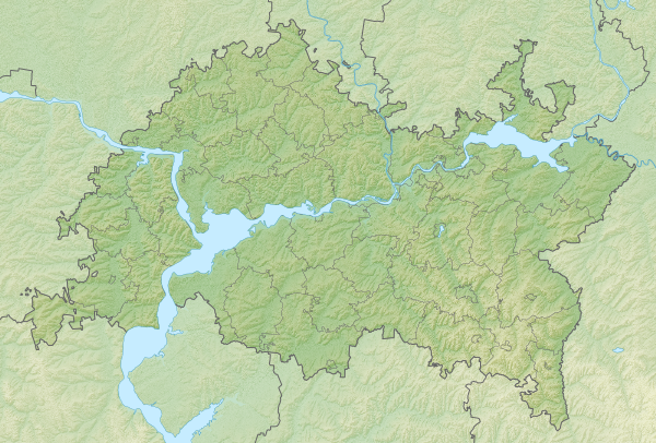 Физическая карта Республики ТатарстанРавноугольная проекция, растяжение - 175%. Координаты краёв: север - 56.8° С юг - 53.9° С восток - 54.5° В запад - 47.0° В